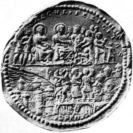 Goldmultiplum-Stempel der 1862 bei Aushubarbeiten in der Saone bei Lyon gefunden wurde.